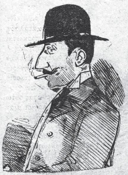 Künstlerkarikatur, Teil eines Kohlenstiftzyklus für die griechische Literaturzeitung Estia